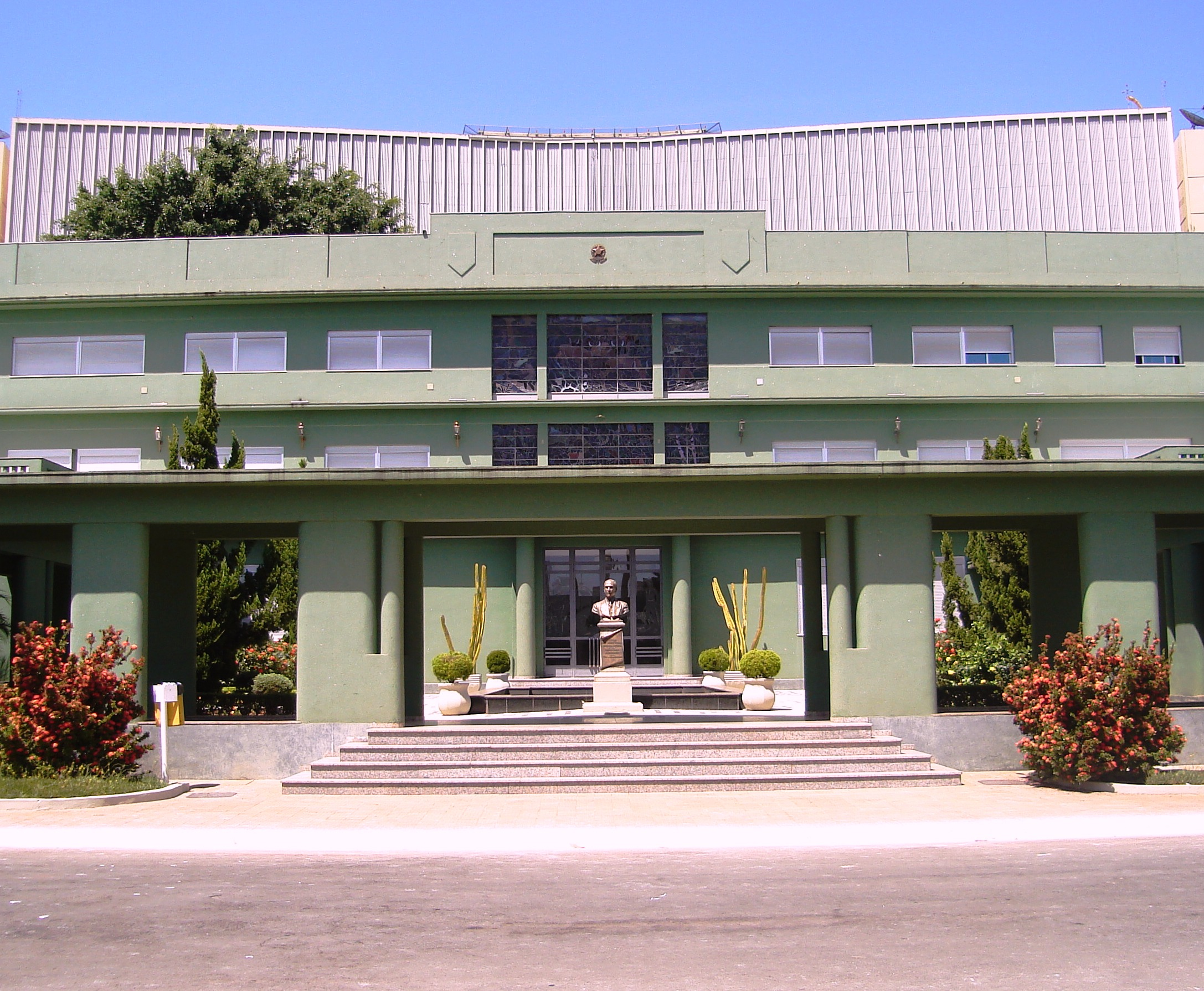 Fachada do Palácio das Esmeraldas, sede do Governo do Estado de Goiás, Goiânia, Brasil.